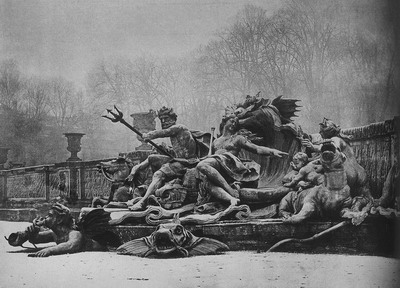 Lambert-Sigisbert Adam and Nicolas Sébastien Adam, Le Triomphe de Neptune et d'Amphitrite (1735 - 1740), plomb (lead), Versailles, Châteaux de Versailles et de Trianon